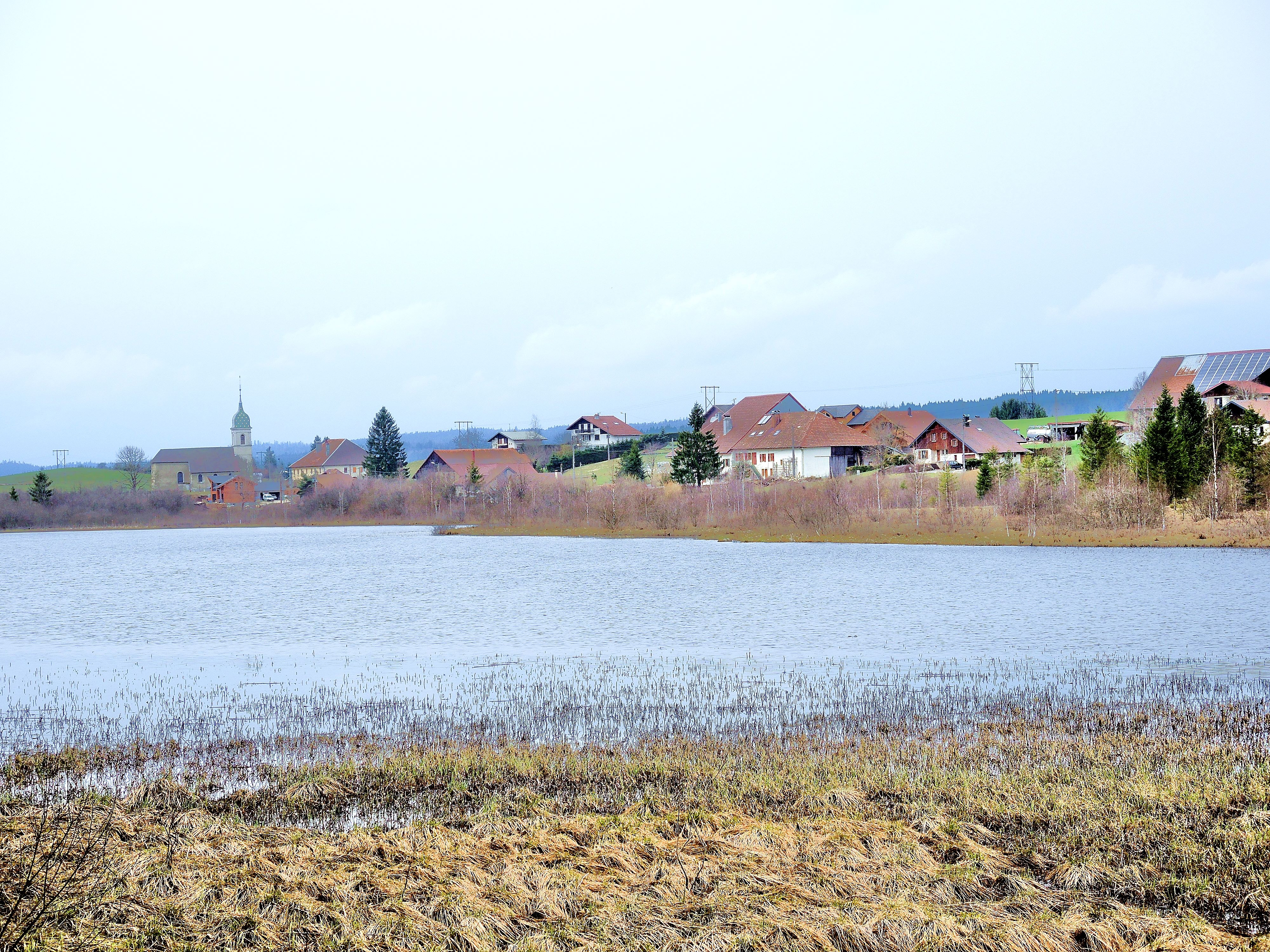 Village de Malpas, vu de derrière le lac.